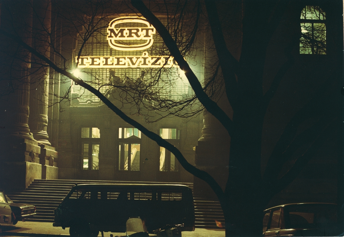 Szabadság tér 17., a Magyar Televízió székháza. Location: Hungary, Budapest V. Tags: colorful, minivan, Budapest Title: Szabadság tér 17., a Magyar Televízió székháza.